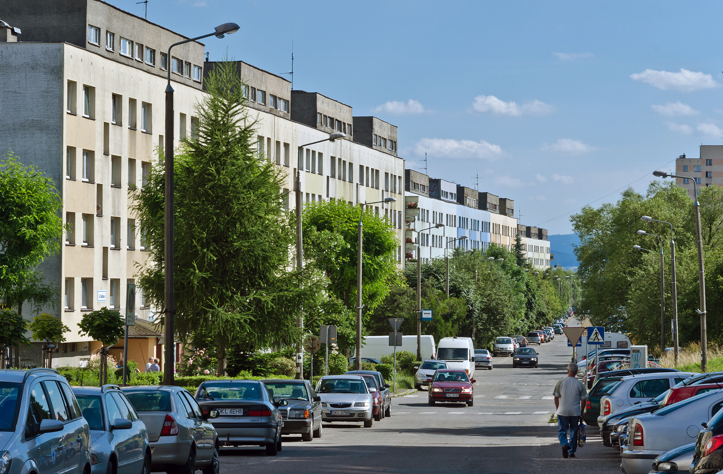 Kłodzko, ul. Rodzinna